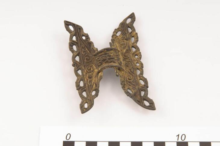 Vergulde bronzen vlinderfibula (zogenaamde gleicharmige Kerbschnittfibel) met bronzen speld en ijzeren spriaal-as. Rijk bewerkt met onder meer aan weerszijden gestileerde dierfiguren. De fibula maakt deel uit van de grafvondst van de â€˜Prinses van Zweelooâ€™. In het midden van de vijfde eeuw na Chr. werd vlak ten zuiden van het oude Drentse dorp Zweeloo een vooraanstaande vrouw begraven. Haar graf werd in 1952 ontdekt. Op basis van textielresten en sieraden kon een reconstructie van haar kleding worden gemaakt. De Prinses draagt een linnen gewaad van zeer fijn weefsel dat op de schouders bijeen wordt gehouden door twee ronde vergulde bronzen spelden. Over het gewaad draagt ze een wollen mantel die op de borst vast wordt gemaakt door een grote vergulde bronzen vlinderfibula. Deze rijk versierde mantelspeld komt uit Noord-Duitsland, wat erop duidt dat de prinses of haar familie contact met de bewoners van dat gebied heeft gehad.